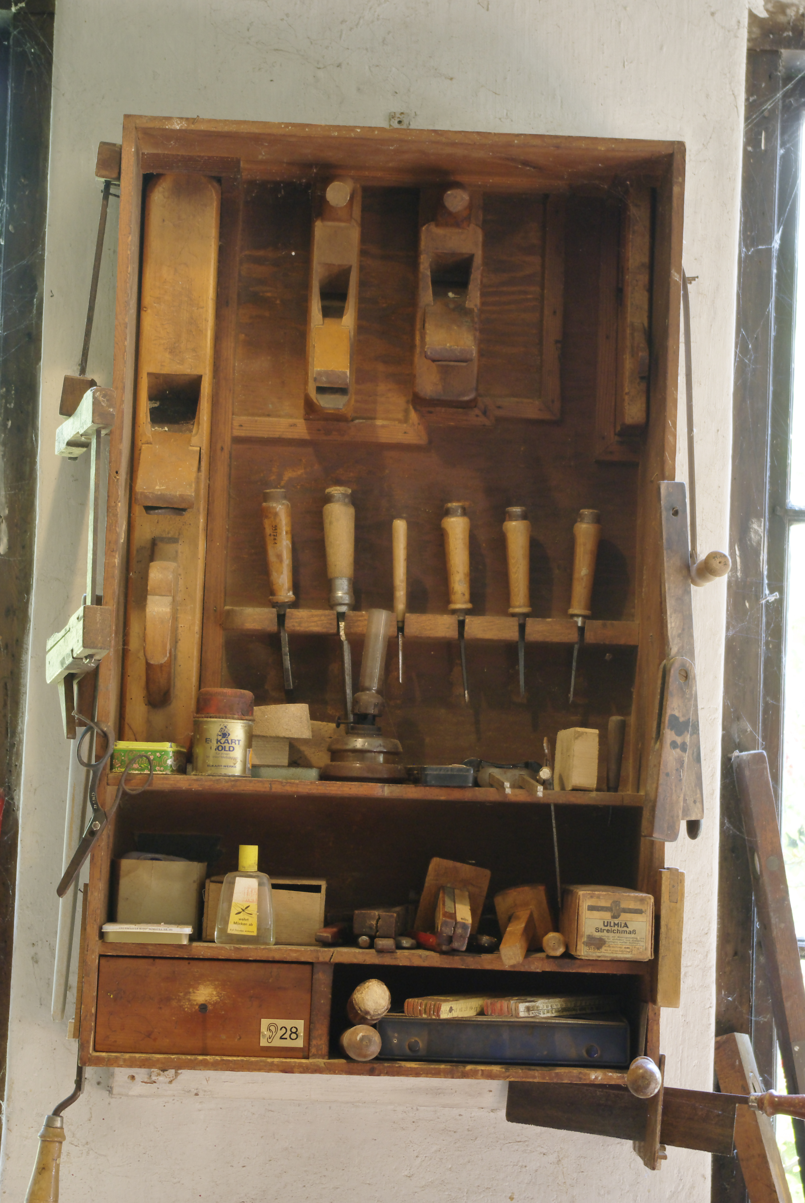 Kulturdenkmale in Friedrichstadt Nummer 60